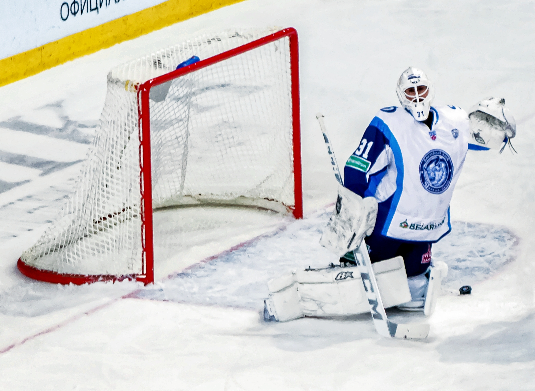 Вратарь минского «Динамо» Дэнни Тэйлор во время матча чемпионата КХЛ против хабаровского «Амура» 5 ноября 2014 года.